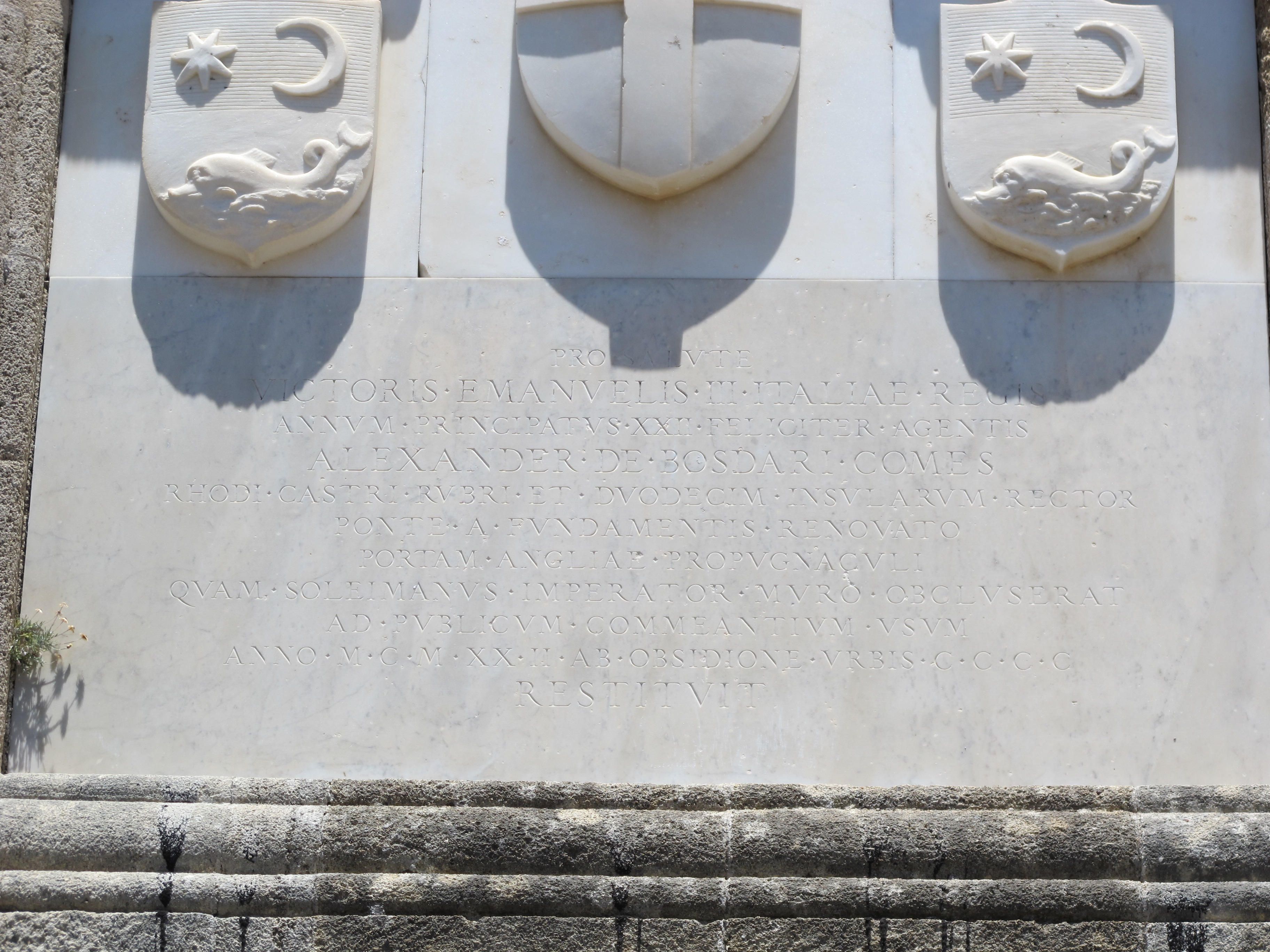 Rodi, porta sant'atanasio, porta esterna 04 targa vittorio emanuele III e alessandro de bosdari